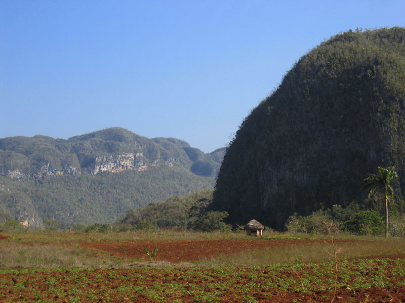 Vallée de Viñales, mogotes